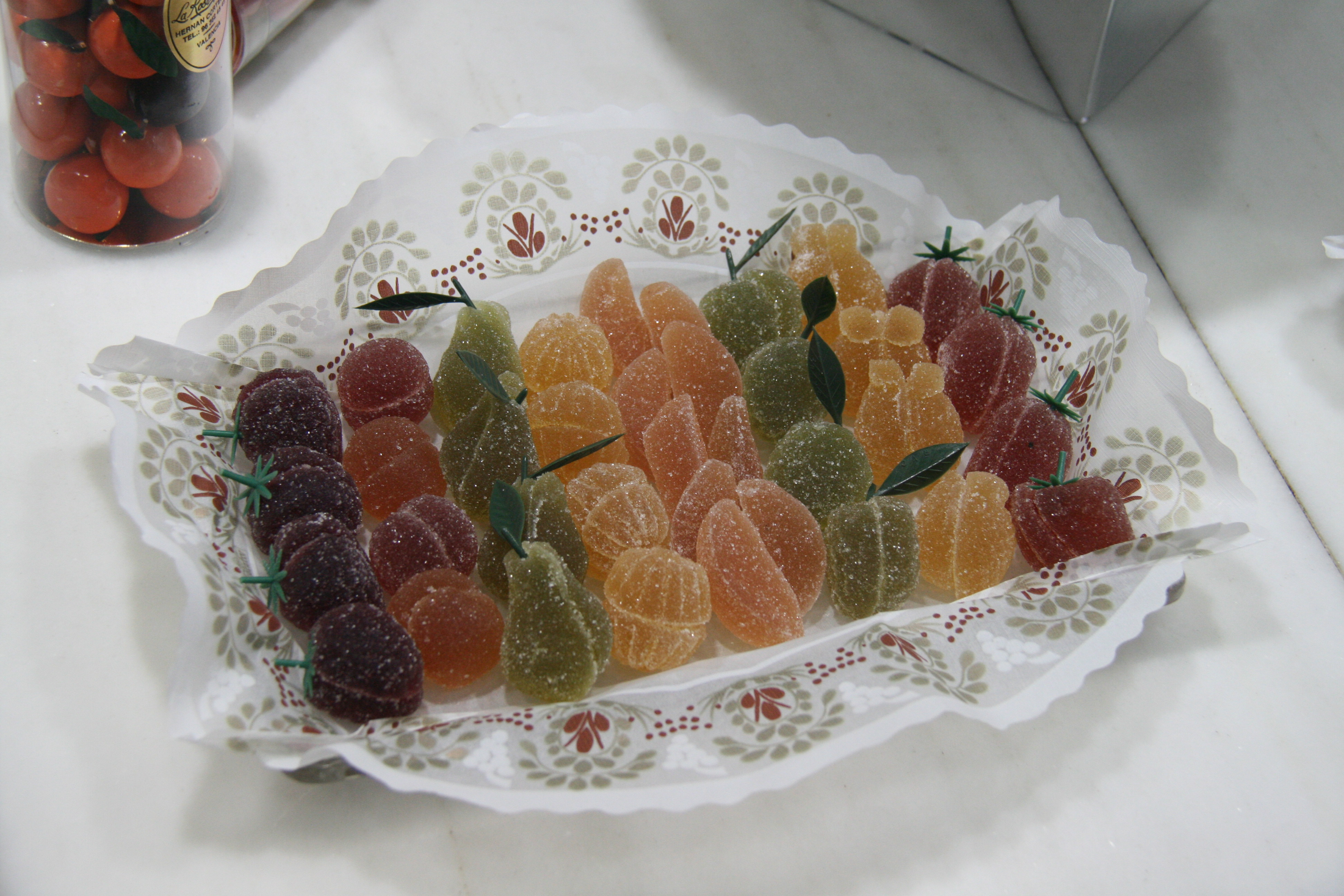 Bsandeja de frutas escarchadas